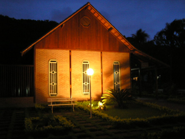 Foto tirada no Mannain da estrada do Magarça no municipio e estado do Rio de Janeiro